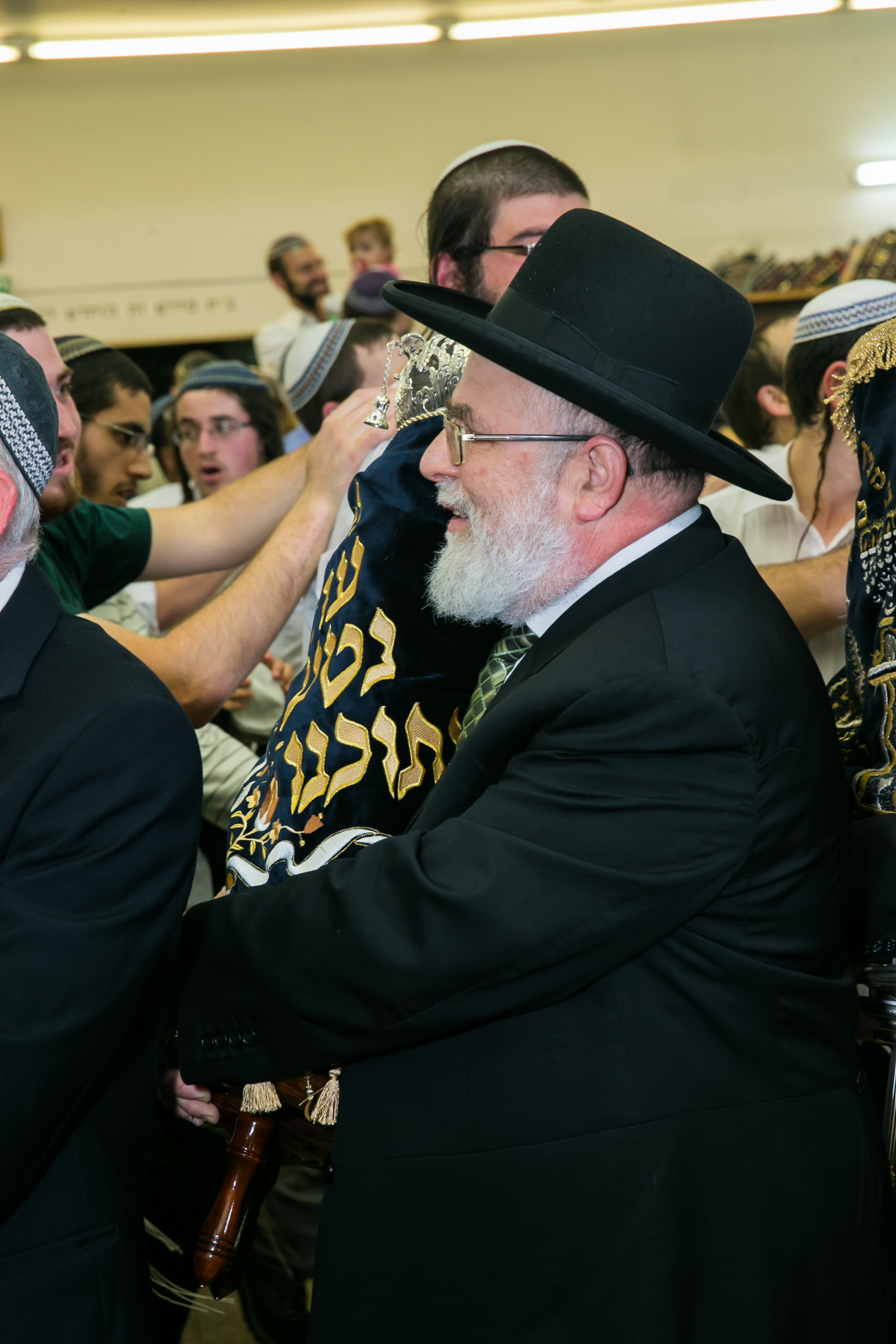 ישיבת מרכז הרב. הרב שלמה שפירא (במרכז) בישיבת מרכז הרב בטקס הכנסת ספר תורה.